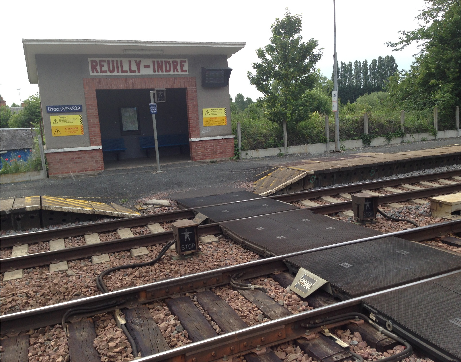 赫伊站